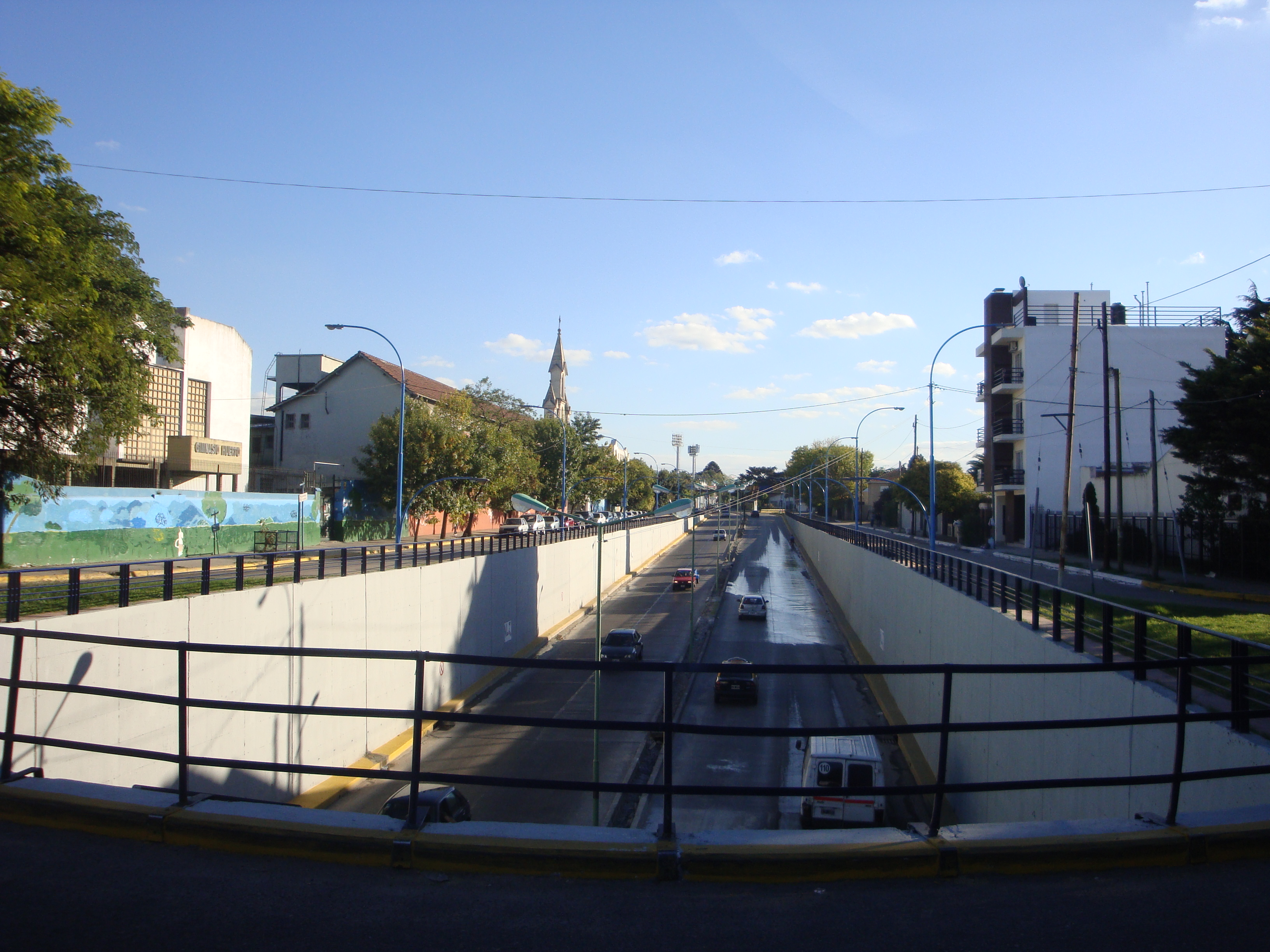 Bajo nivel en la Avenida 9 de Julio, en Temperley.